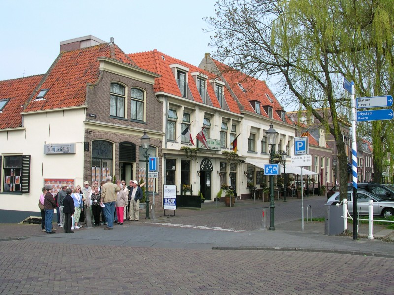 Stadswandeling van toeristen met een gids in de stad Enkhuizen. Tourist in the city Enkhuizen on a city walk with a guide.